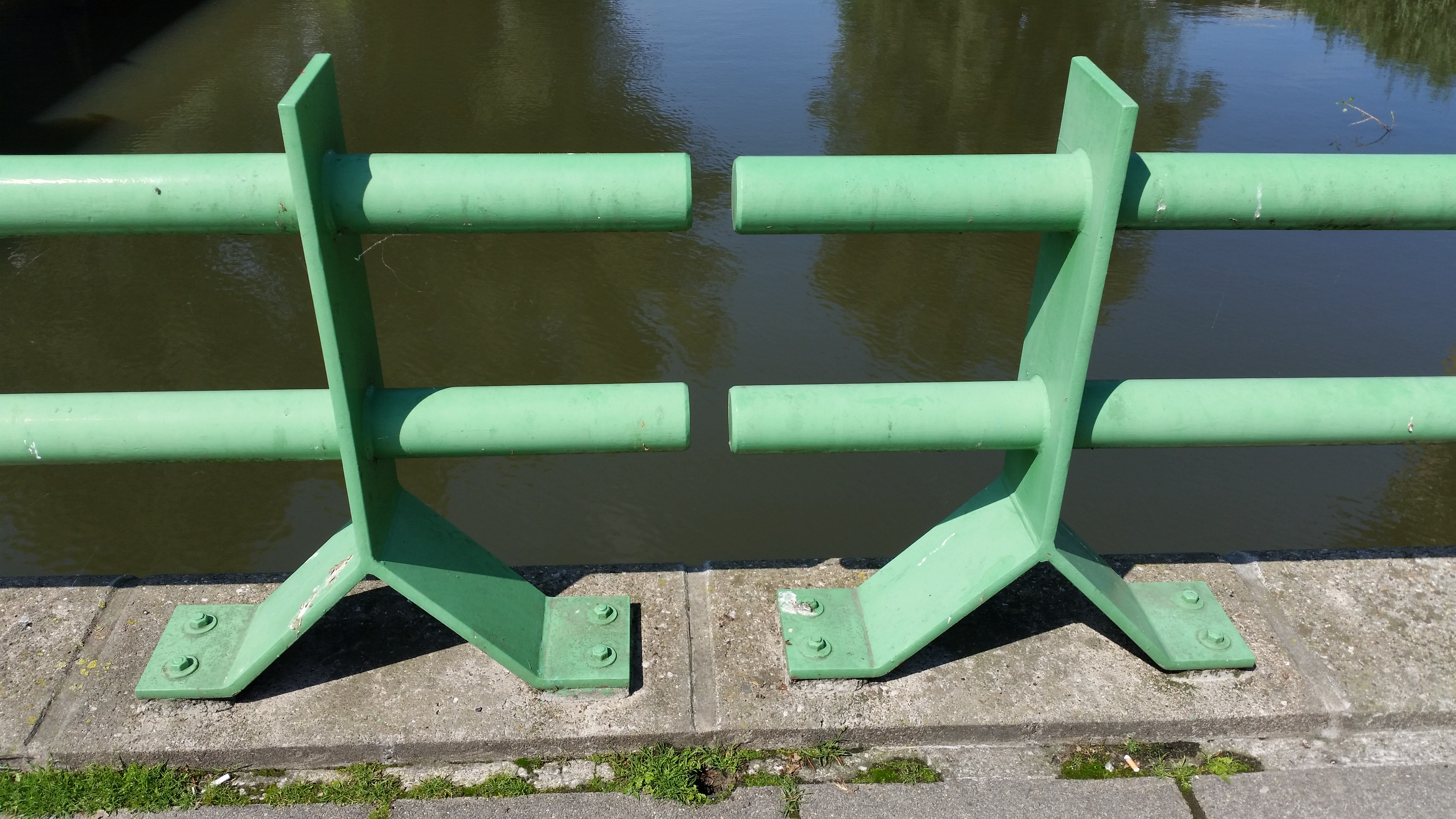 Balusters van Brug 1802 (in Amsterdam)